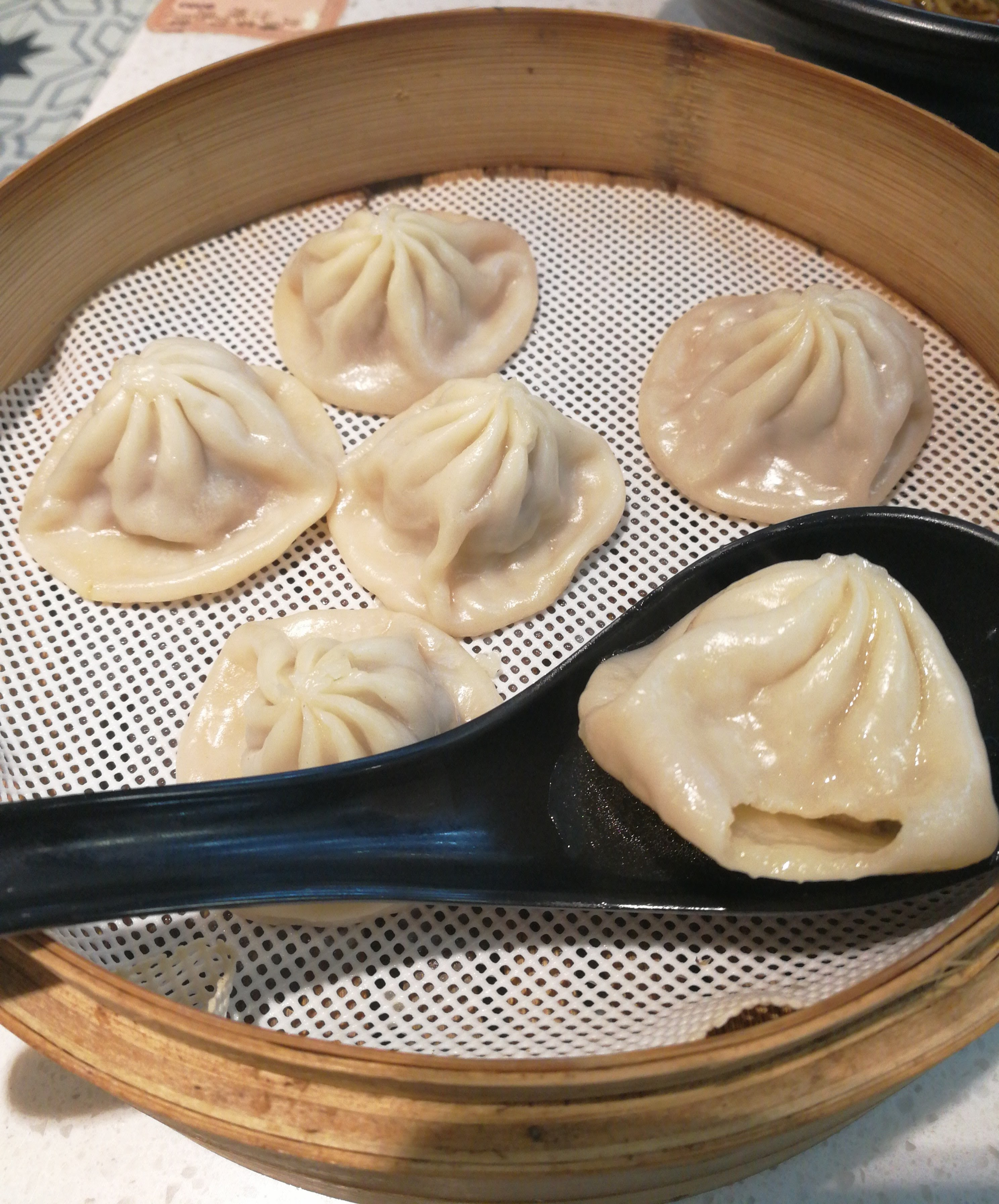 Tipici ravioli cinesi